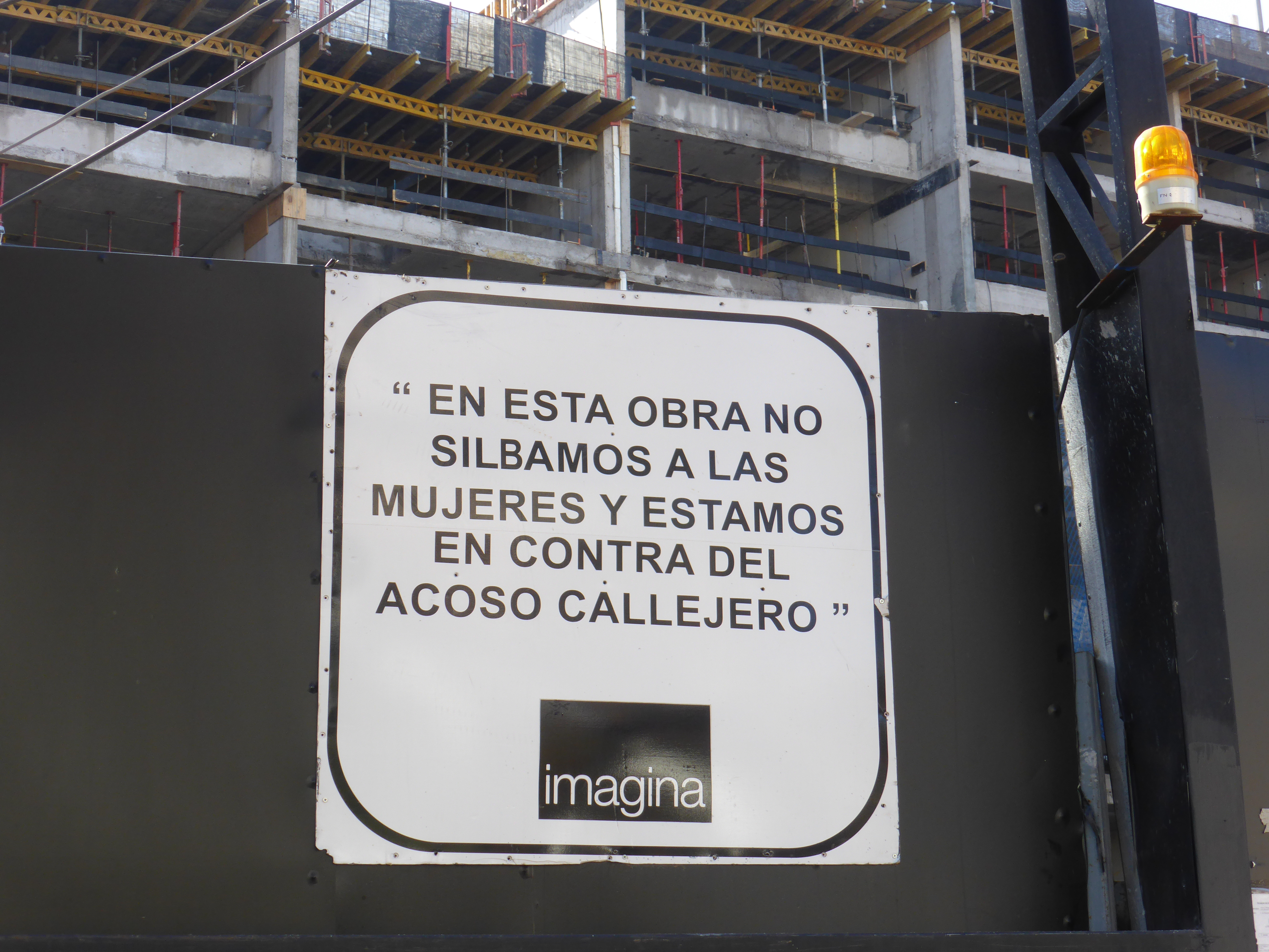 "En esta obra no silbamos a las mujeres y estamos en contra del acoso callejero". Cartel, en junio de 2020, en una obra en la calle Eduardo Castillo Velasco, n° 2958. Edificación destino habitacional. Comuna o municipalidad de Ñuñoa. Santiago de Chile.